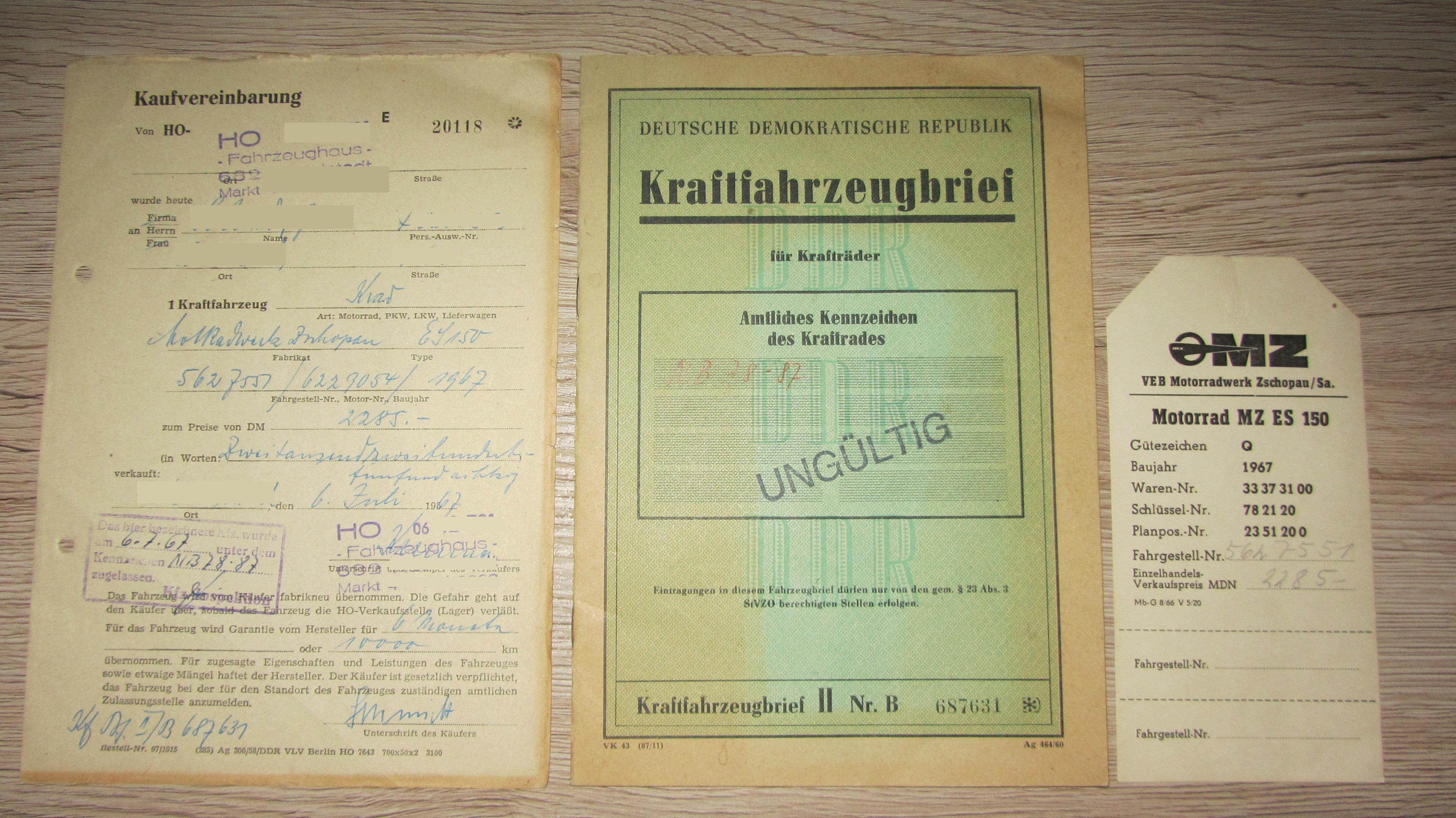 Foto beinhaltet einen Original-Kaufvertrag, das Preisschild sowie den DDR-Fahrzeugbrief einer MZ ES 150 aus dem Jahr 1967, inkl. Stempel und Unterschriften sowie Kennzeichen etc. einige private Daten sind gestrichen